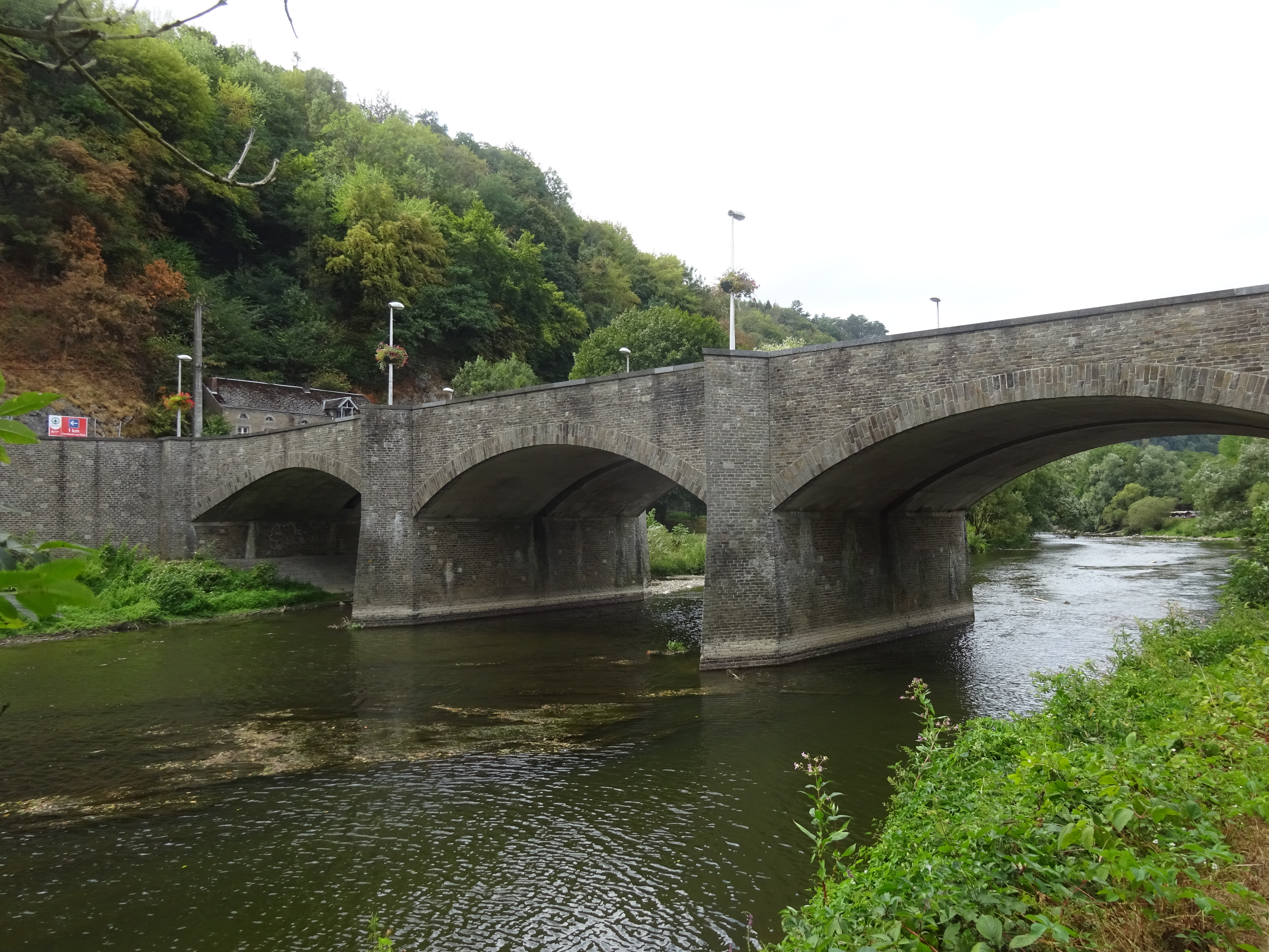 Pont de Sçay, Comblain-au-Pont